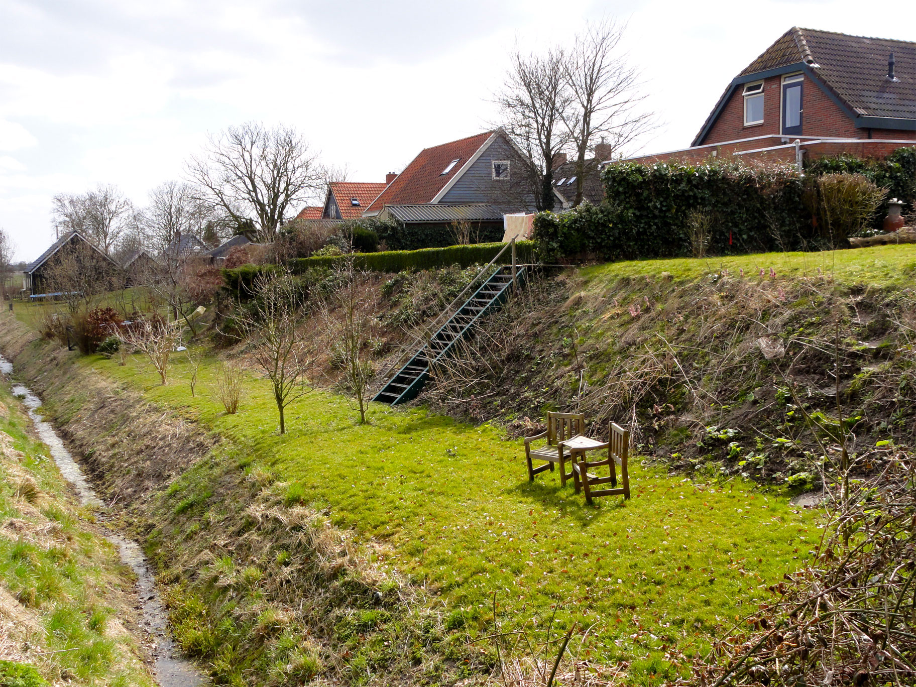 Huizen van Rottum op de gedeeltelijk afgegraven wierde